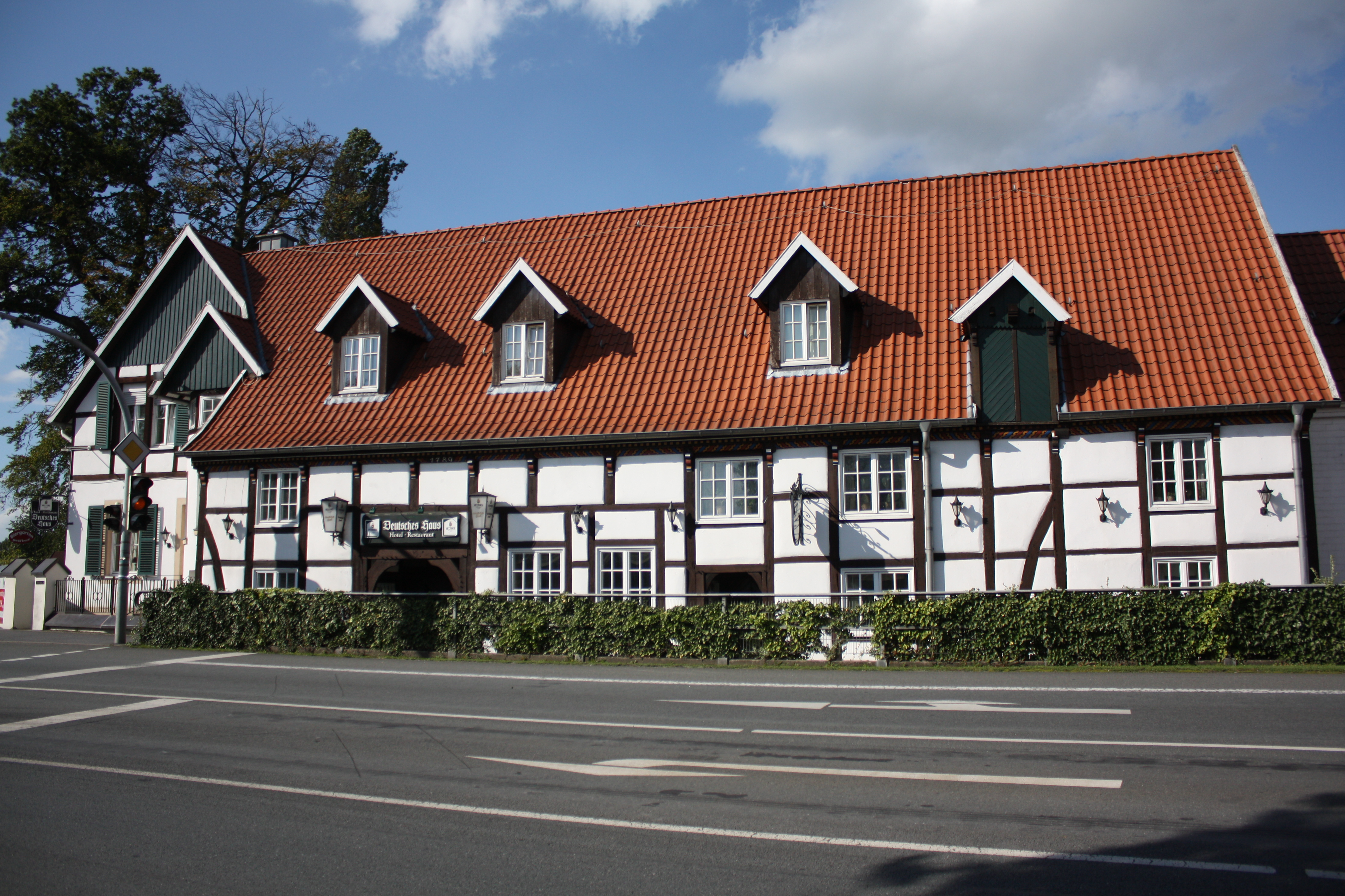 Deutsches Haus in Marienfeld, Nr. 41 der Denkmalliste von Harsewinkel